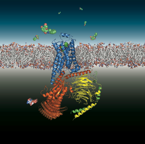 Beta-adrenoceptor and attached G-protein